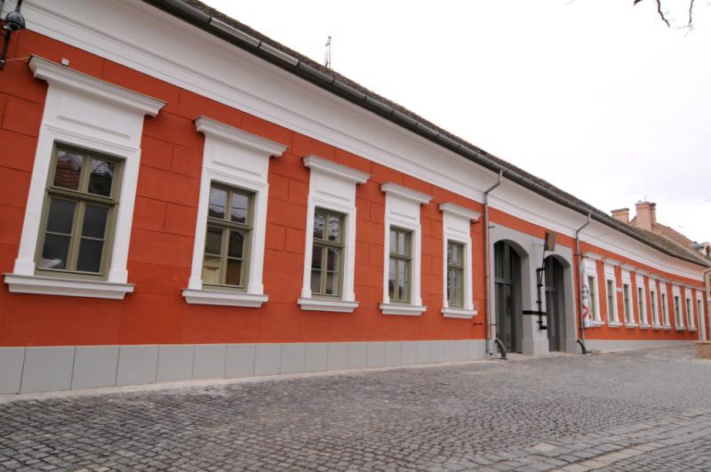 A MűvészetMalom utcafront, Szentendre